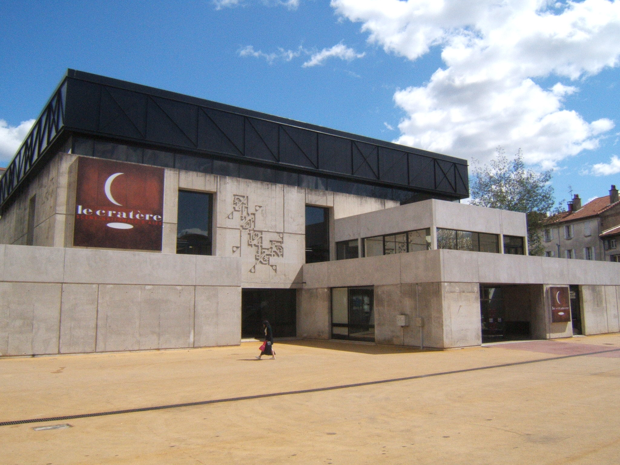 le cratere théâtre ales